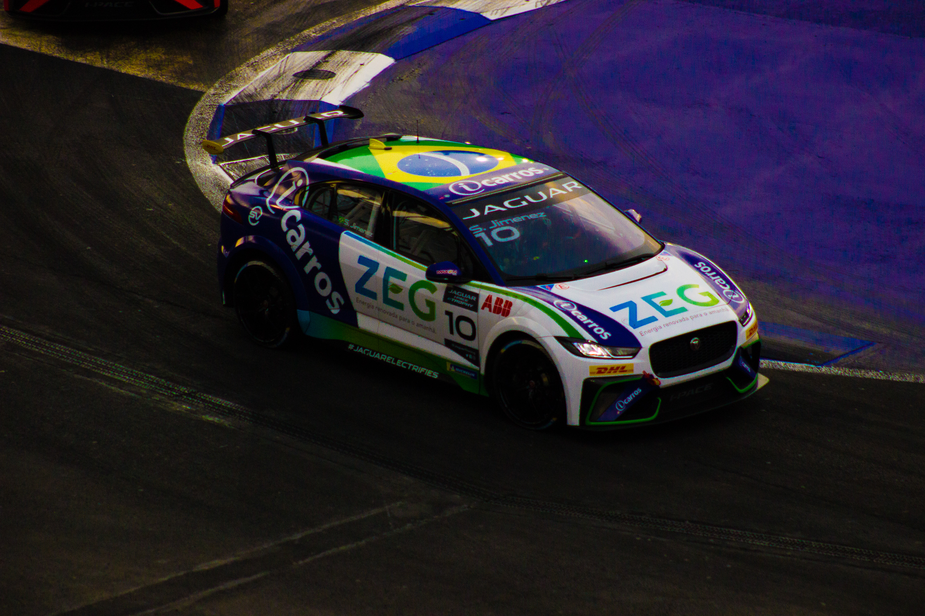 2019-20 Jaguar I-PACE eTROPHY Round 3, CBMM Niobium Mexico City E-Prix 2020, Autódromo Hermanos Rodríguez, Ciudad de México, 15 de febrero 2020.